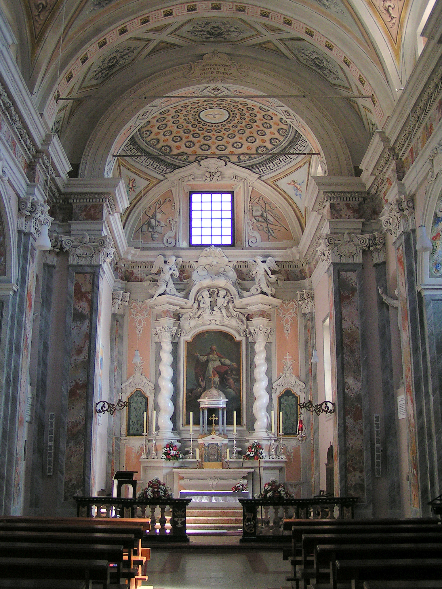 Altare Maggiore Chiesa di Sant'Agata Mugena Foto scattata dall'utente Elvezio